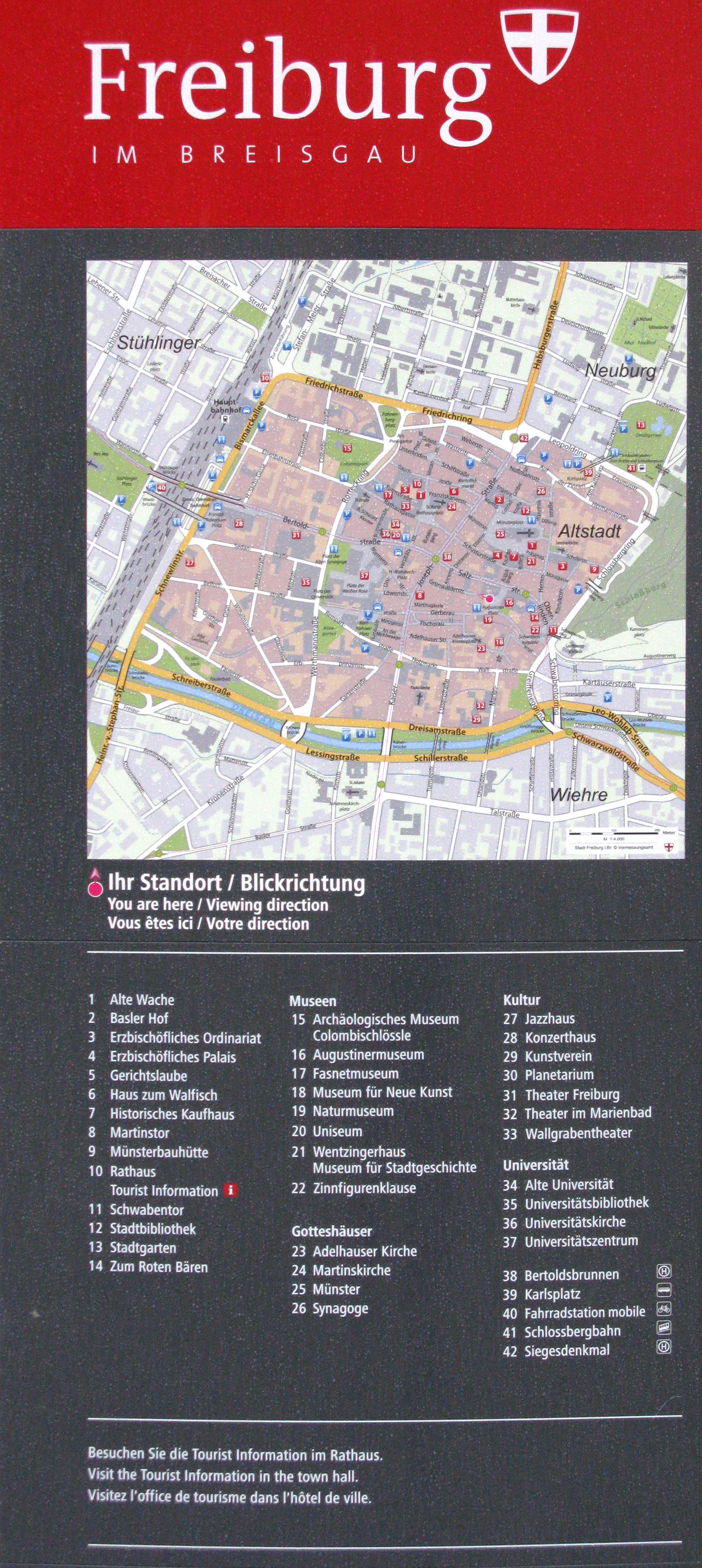 Fußgängerleitsystem in Freiburg